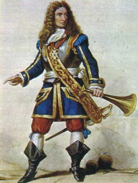 René Duguay-Trouin, french corsair.